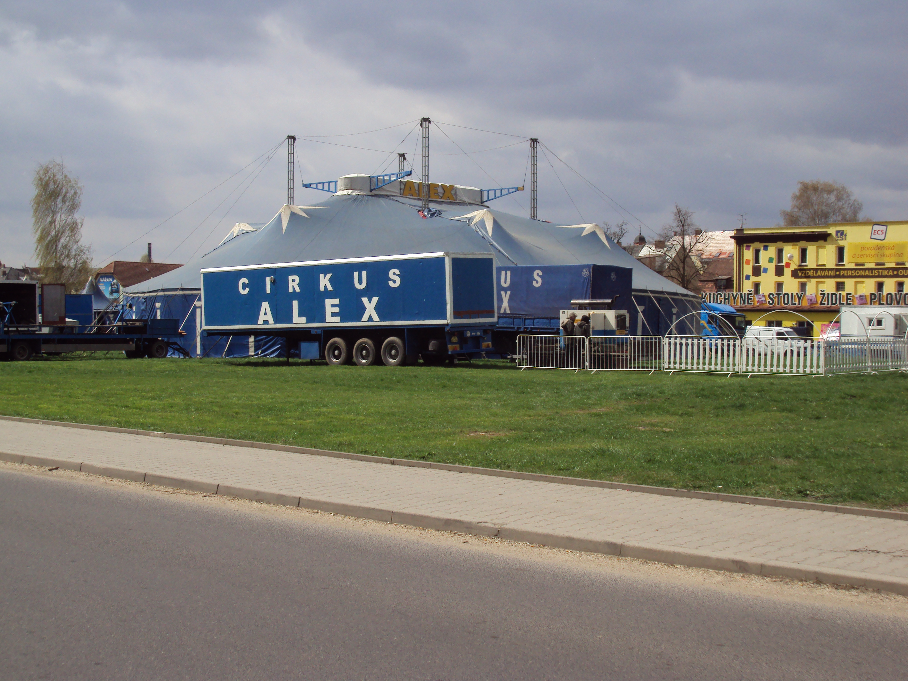 Cirkus Alex v České Lípě